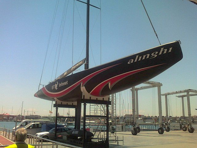 IACC Yacht Alinghi 4 (SUI 100), späterer Americas Cup Siegerin, auf der Alinghi-Teambasis in Valencia / Spanien während des Luis Vuitton Cup / Americas Cup 2007